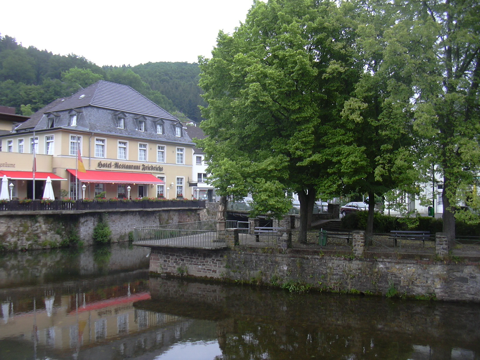 Gemünd, Northrhine-Westphalia; Olef and Urft; St. Nepomuk